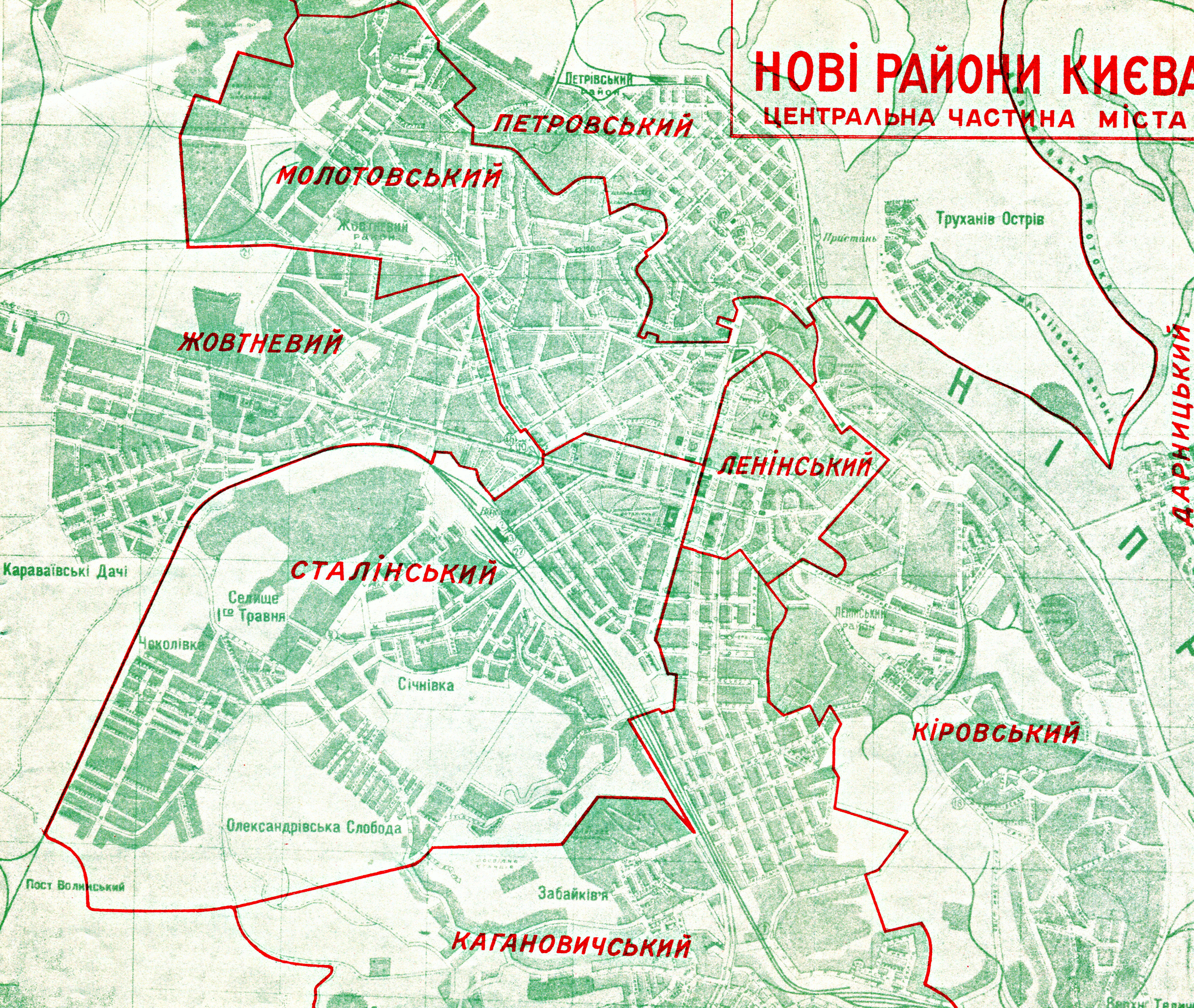 Административное-территориальное деление Киева по состоянию на 1937 год